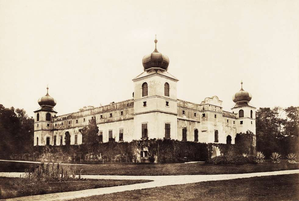 Brunóc kisközség Nyitra vármegye. Mednyánszky-kastély. A felvétel 1895-1899 között készült.